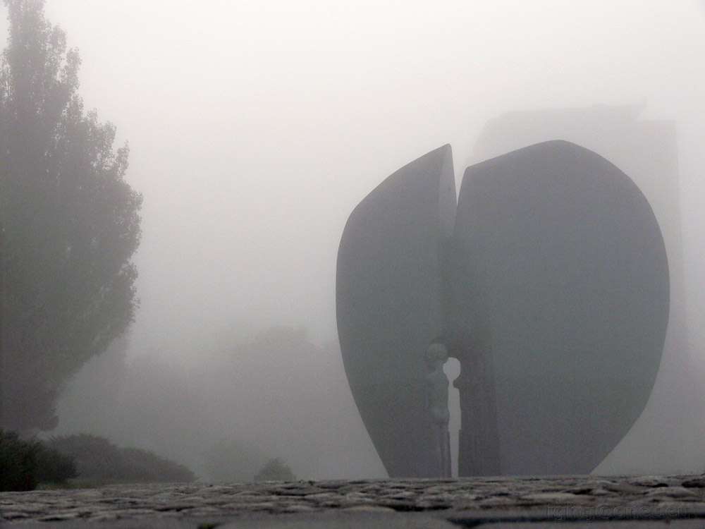 Zdjęcie przedstawia pomnik w Parku Promienistych/Szarych Szeregów w Łodzi